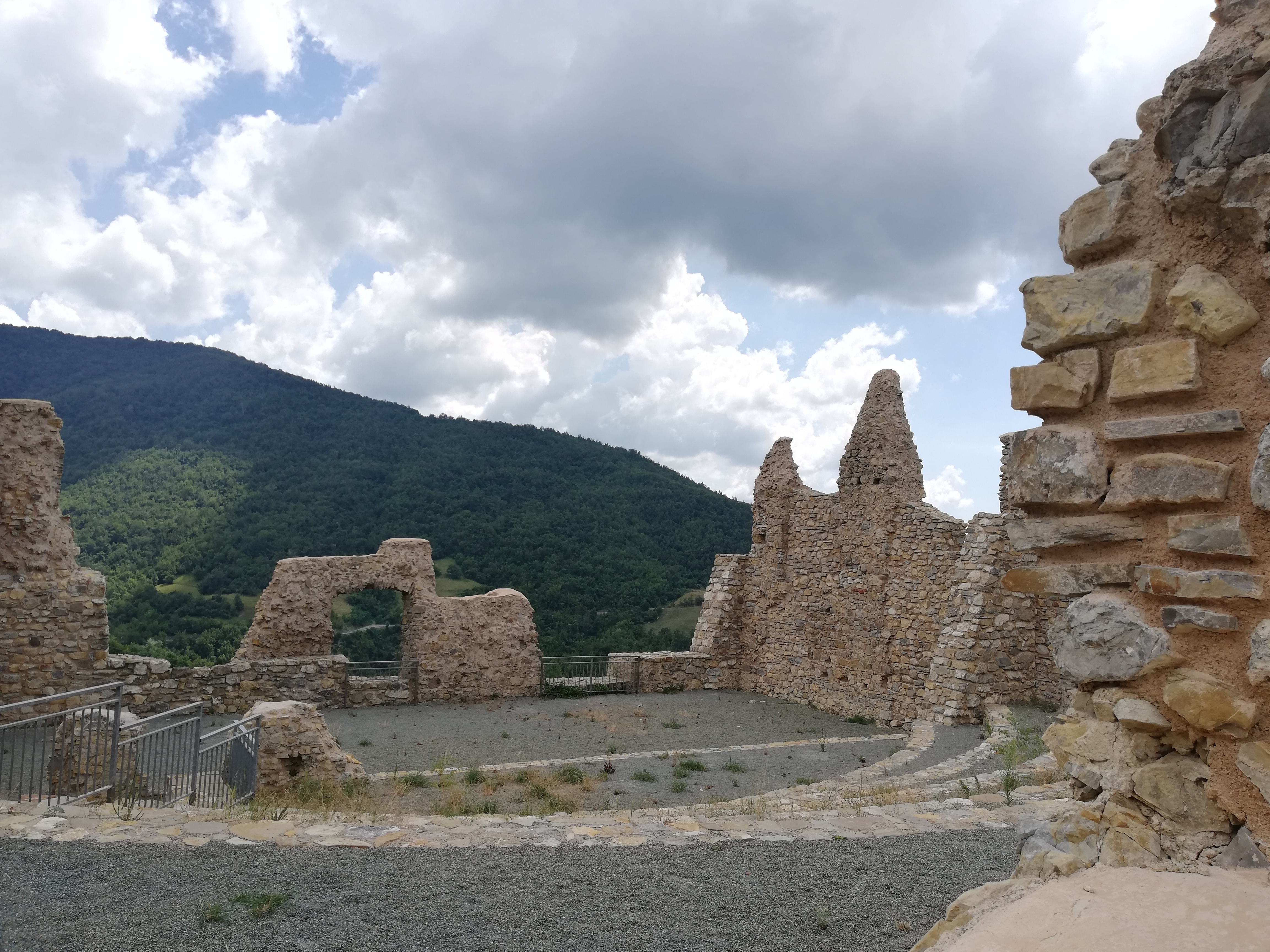 vista dall'interno del castello di Montessoro (lato nord)